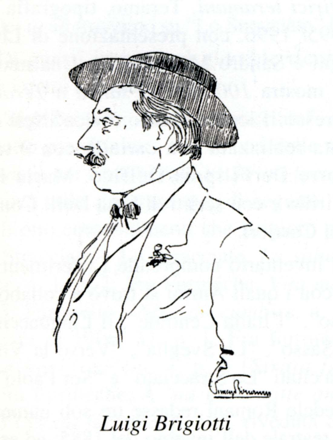 Da "Lo stracciato" Teramo 1905-1907, caricatura del poeta Luigi Brigiotti ad opera di Vincenzo Bonanni (1884-1918)